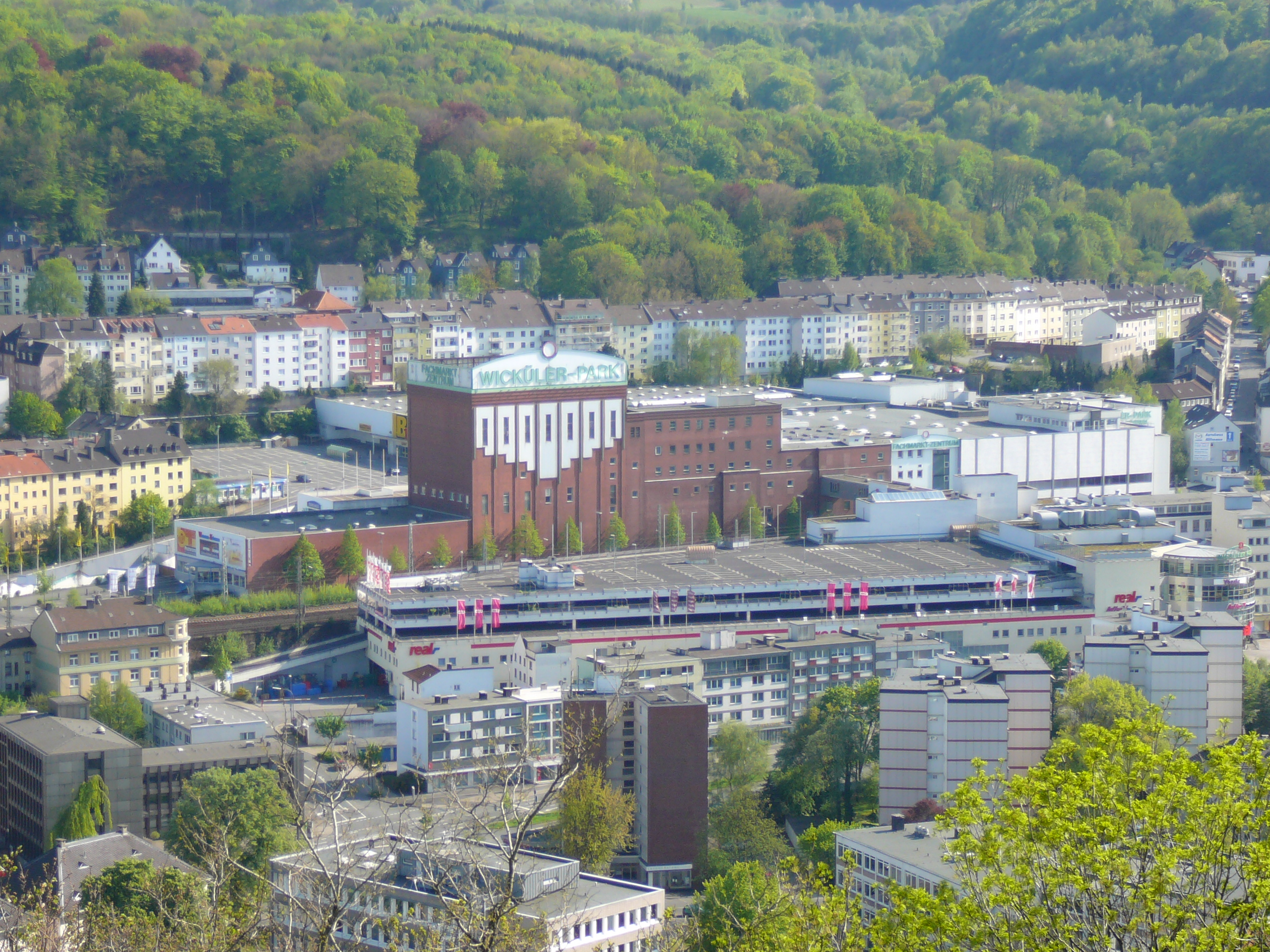 Hardt-Anlagen, Wuppertal